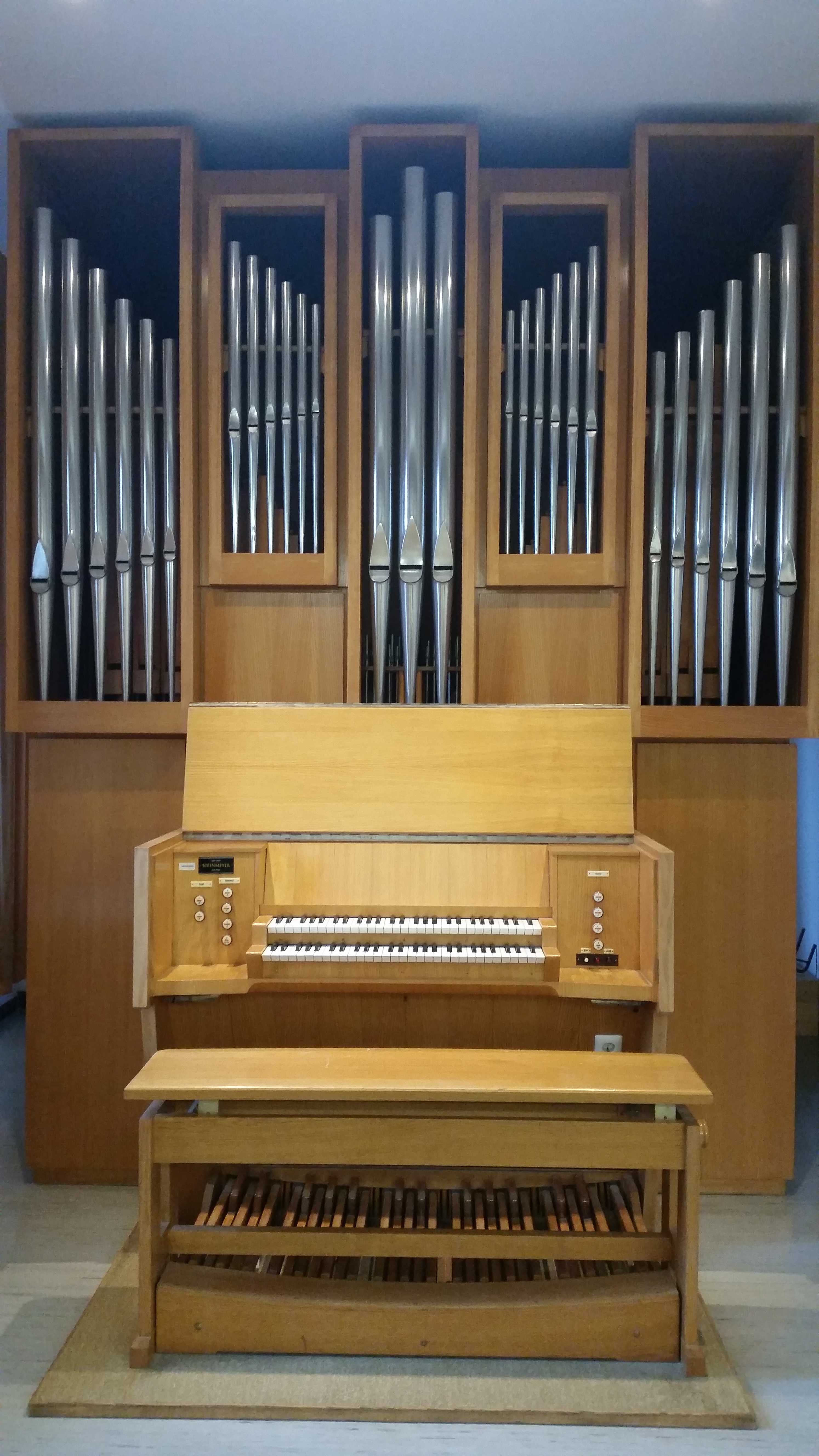 Steinmeyer-Orgel; kleiner Musiksaal Matthias-Grünewald-Gymnasium Würzburg